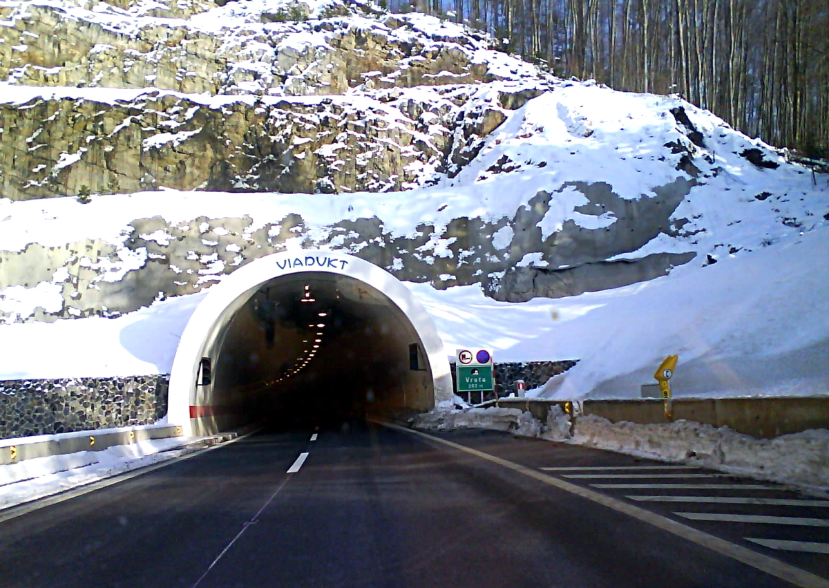 Autocesta A6